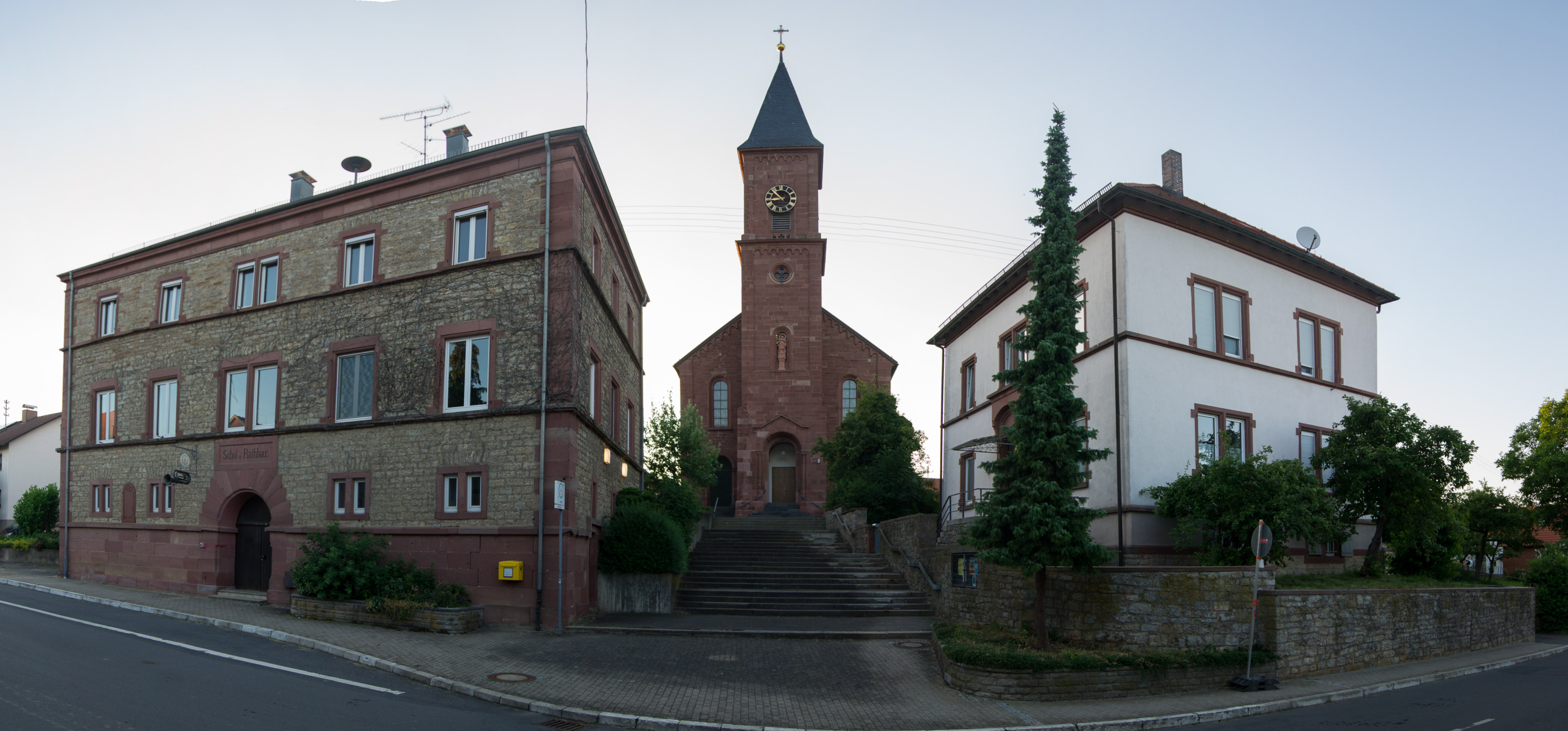 Süd Seite von St. Kilian (mitte) Links das alte Schul und Rathaus von Pülfringen Rechts das Pfarrhaus von St. Kilian